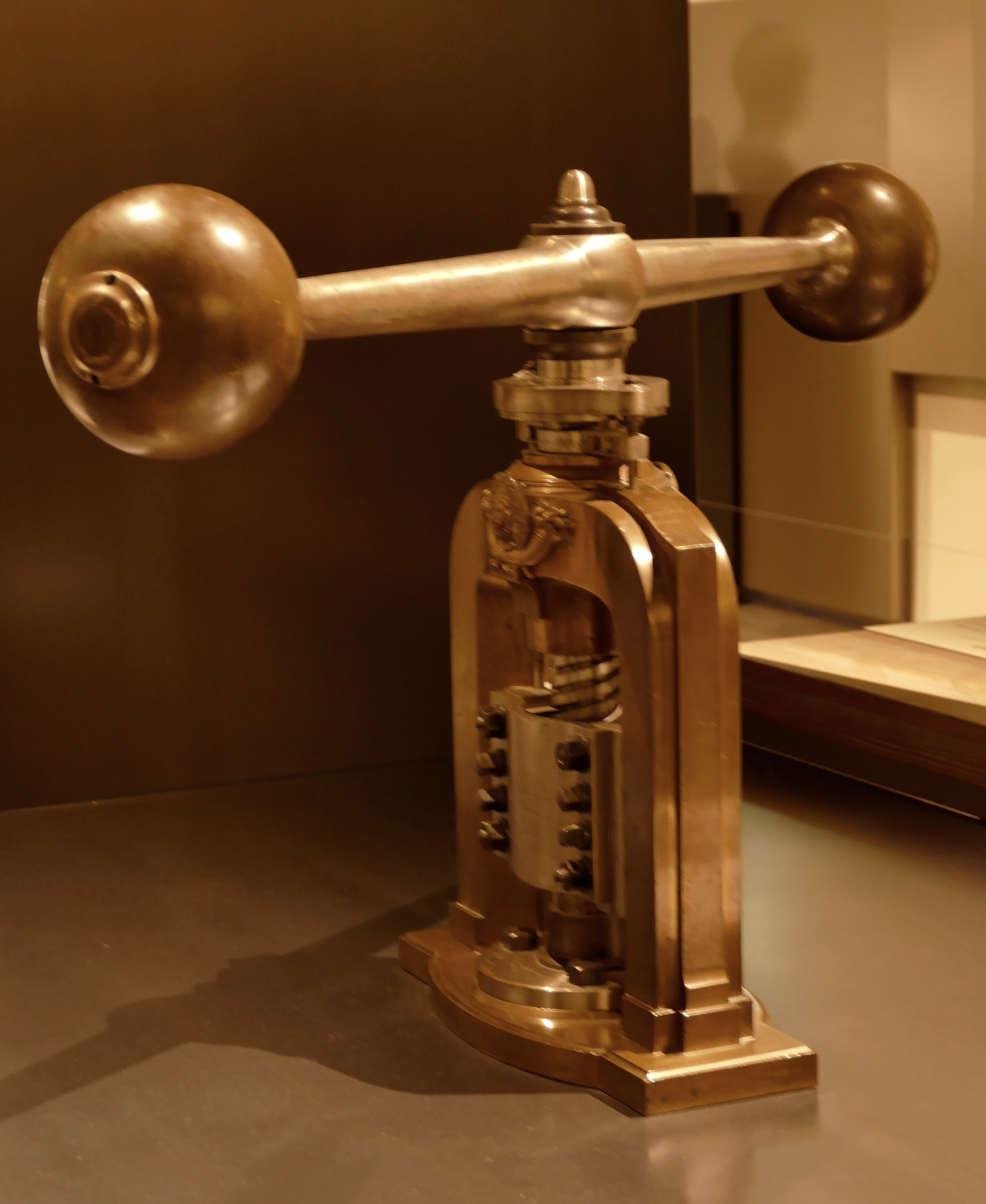 Balancier dit De Brézin 1775, bronze, fer, laiton, hauteur environ 120 cm. Musée de la Monnaie, 11 rue Conti, Paris.